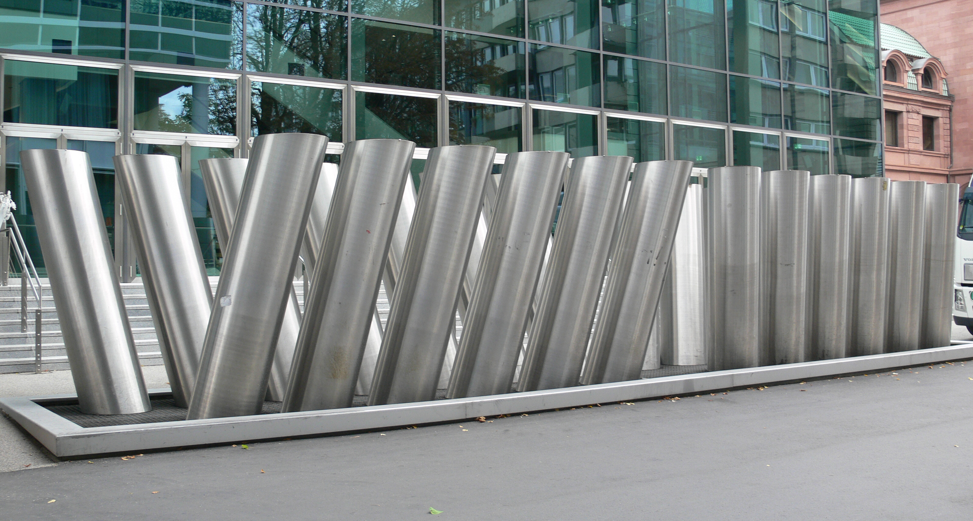 André Volten: Luftbrunnen (1973/1974), Rosengarten Mannheim